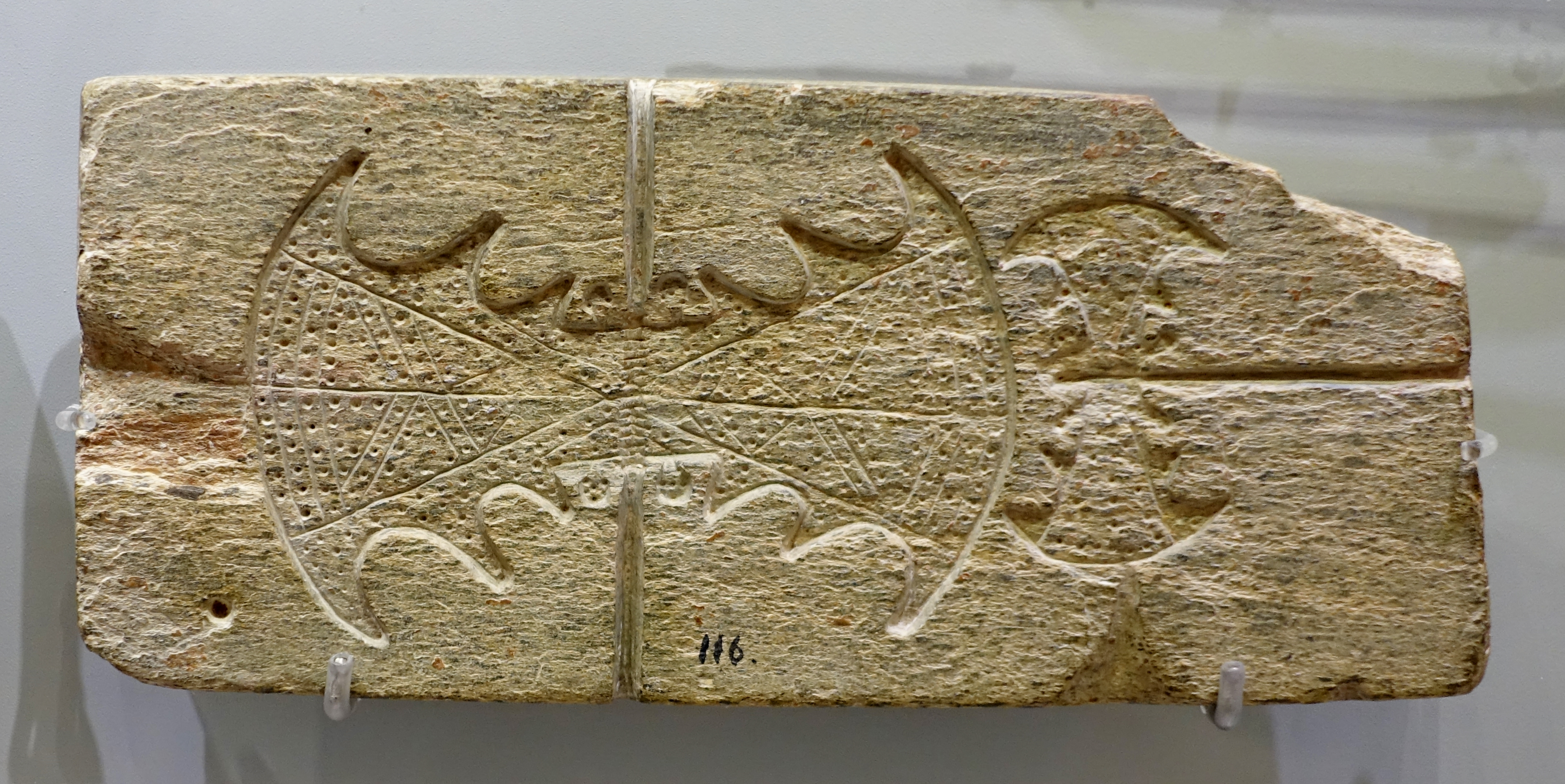 Schieferform zum Gießen von Kultfiguren und Symbolen, gefunden nahe dem Weiler Agia Triada an der Straße von Palekastro nach Sitia (1370–1200 v. Chr.), Archäologisches Museum von Iraklio, Kreta, Griechenland